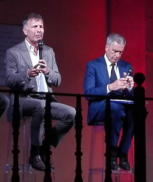 Foto del dibattito pubblico svoltosi il 20/06/2018 tra Bruno Valentini (a destra) e Luigi De Mossi (a sinistra), candidati sindaco di Siena al ballottaggio del 24 giugno 2018